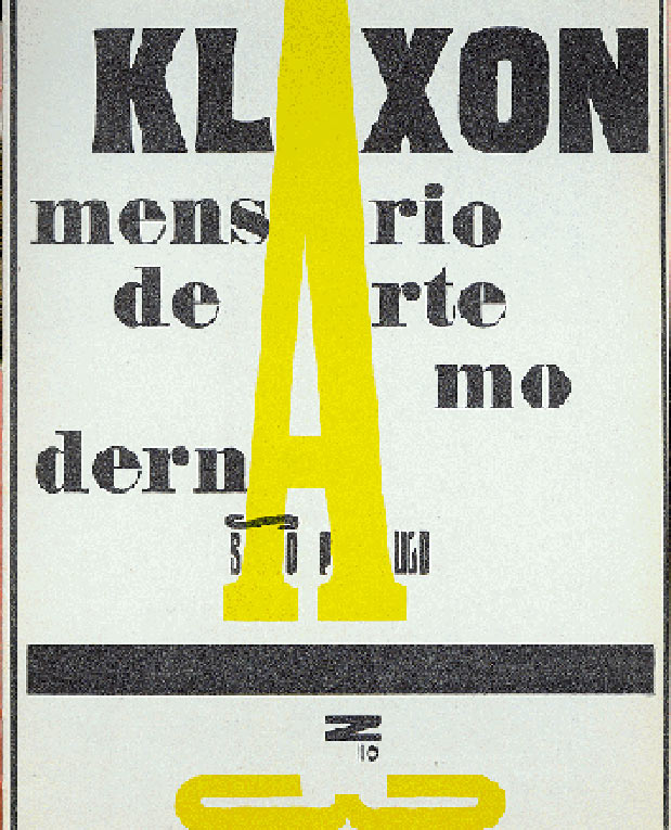 Revista modernista Klaxon, n. 3